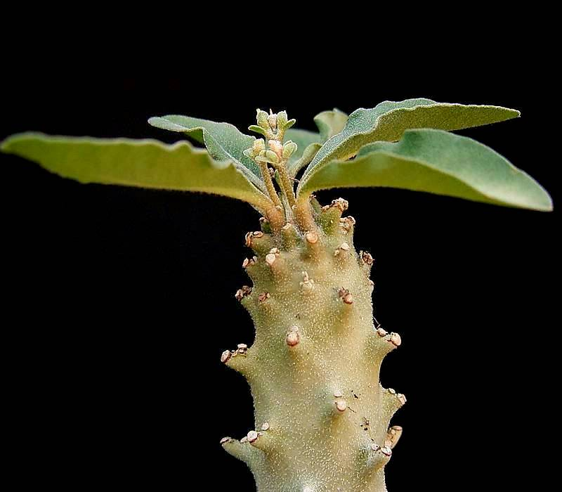 Euphorbia hadramautica napoides form